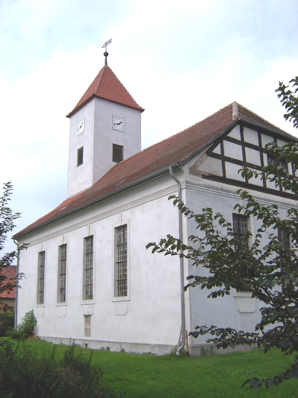 Paplitz, Sachsen-Anhalt, Germany, church